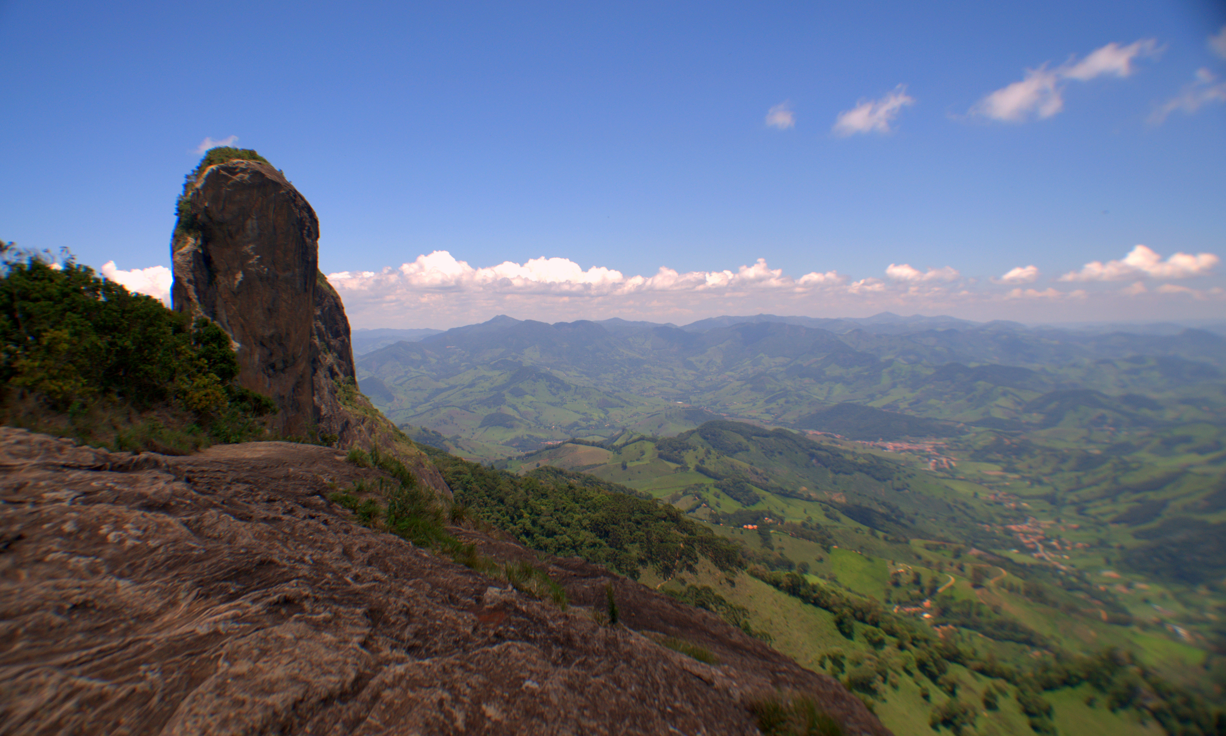 do topo da Serra da Mantiqueira